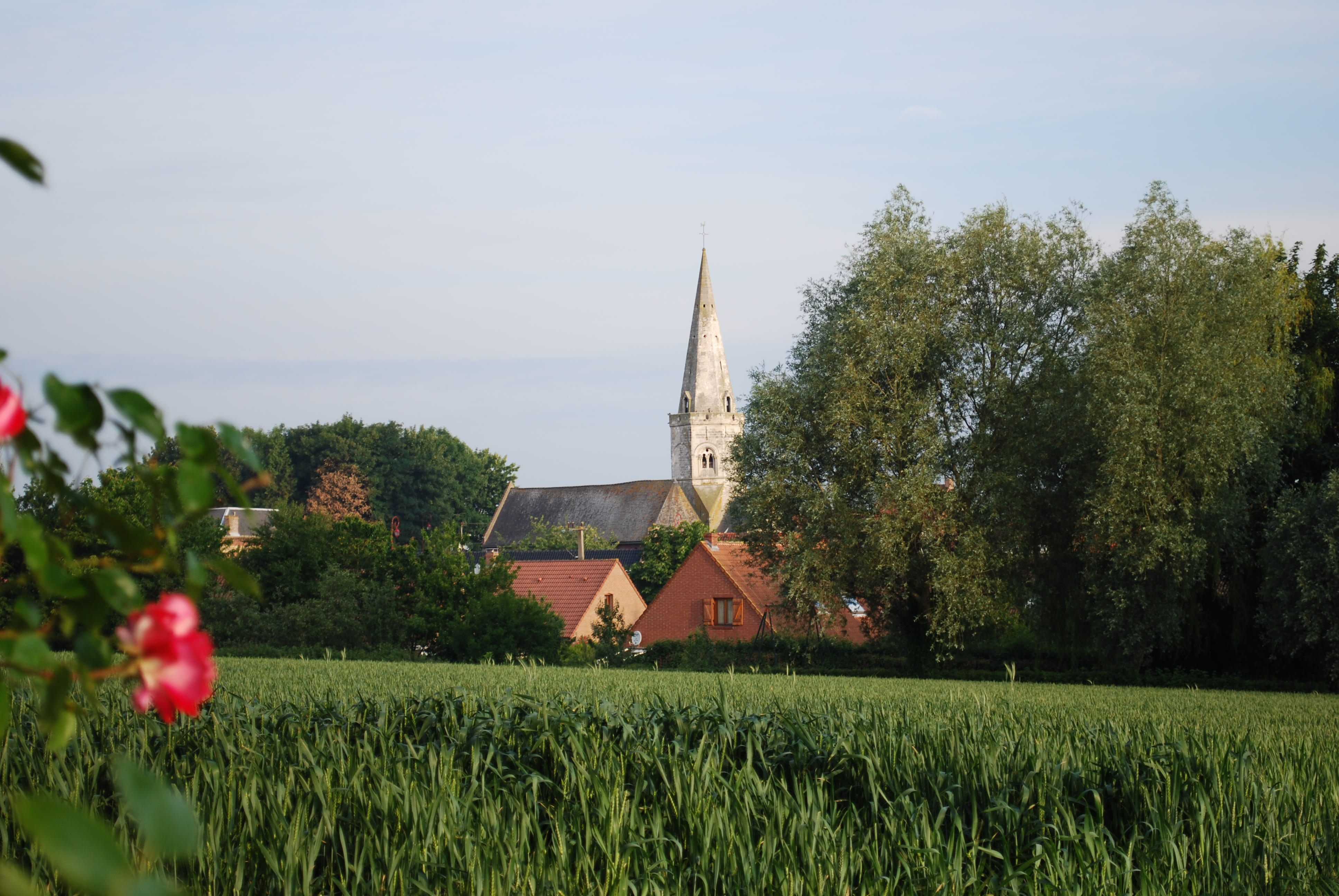 Eglise de Sercus